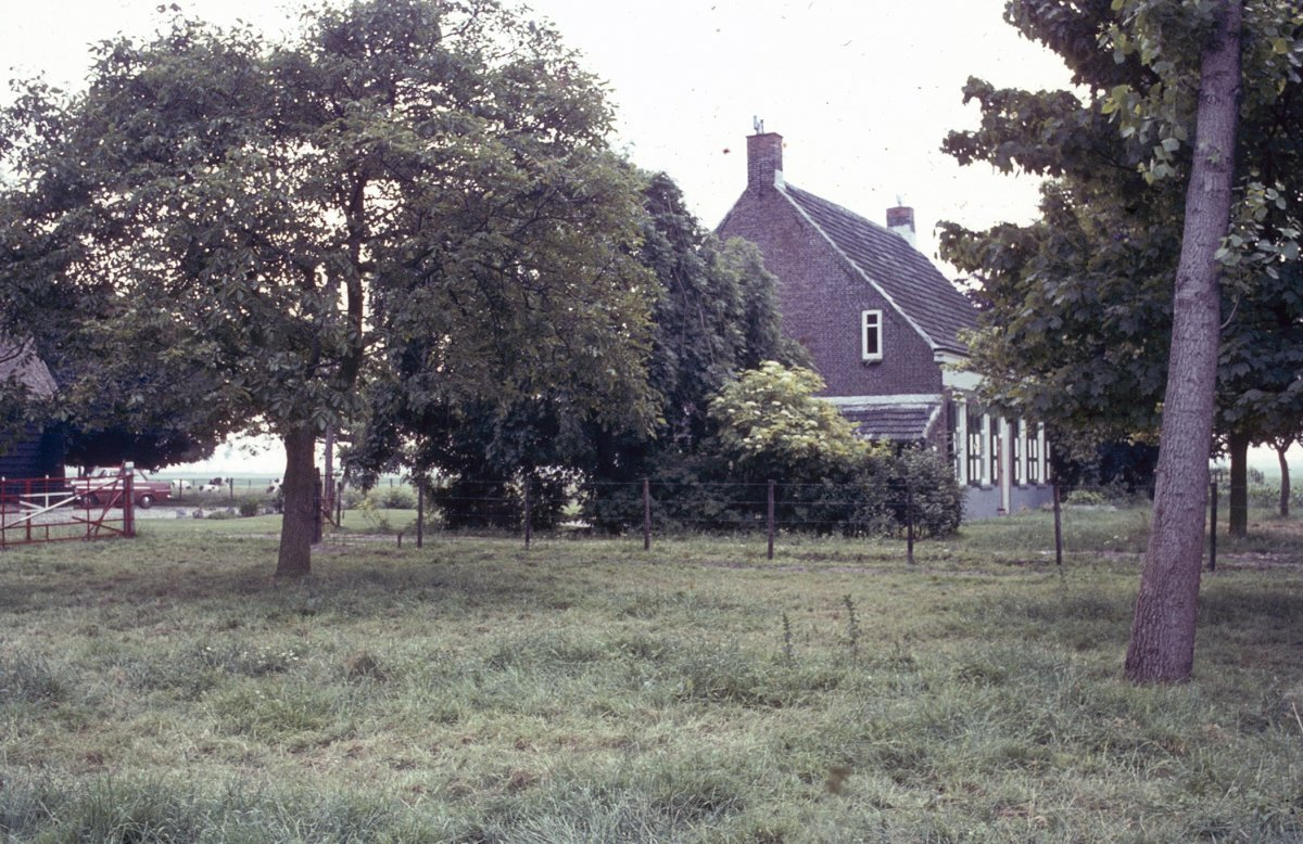 Boerderij: Exterieur OVERZICHT WOONHUIS This is a possible Rijksmonument:Find the monument in the Monuments database:in MagretteAll Rijksmonumenten in MagretteIs this a Rijksmonument?YesNoMore information about this project and help. More images to work at in Category:Possible Rijksmonumenten.